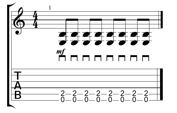 Пример риффа даунстроком